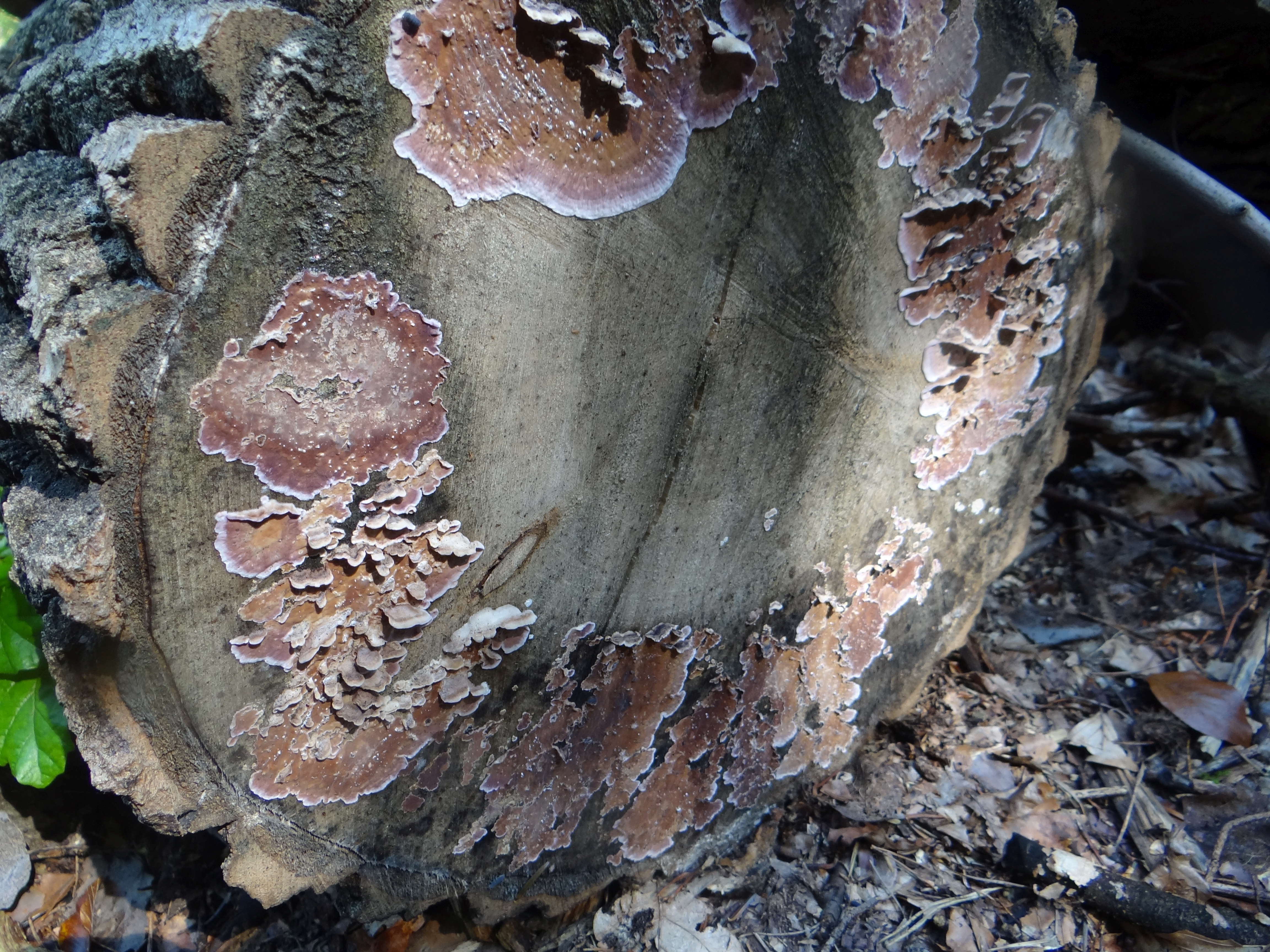 Chondrostereum purpureum. Location: Poland, Kamionna (województwo małopolskie)